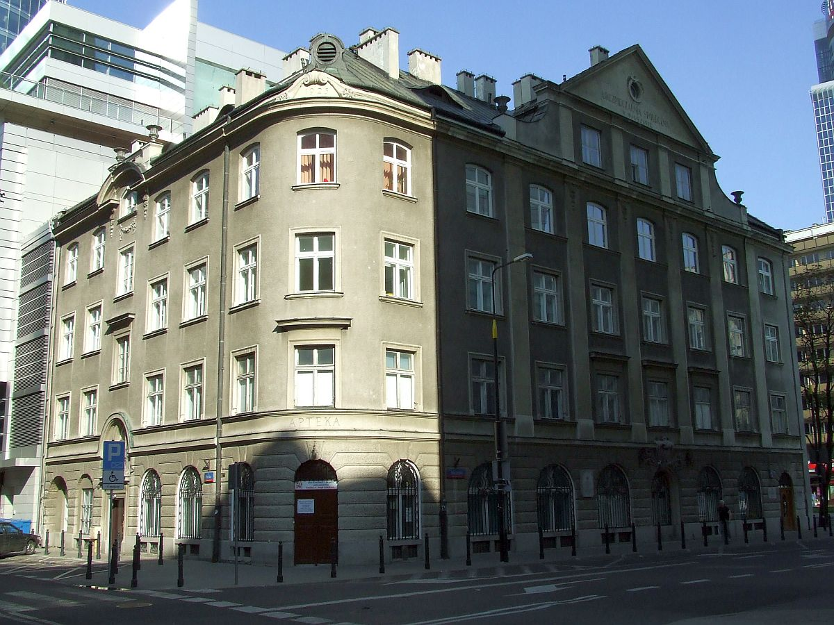 Żydowska Szkoła Pielęgniarek